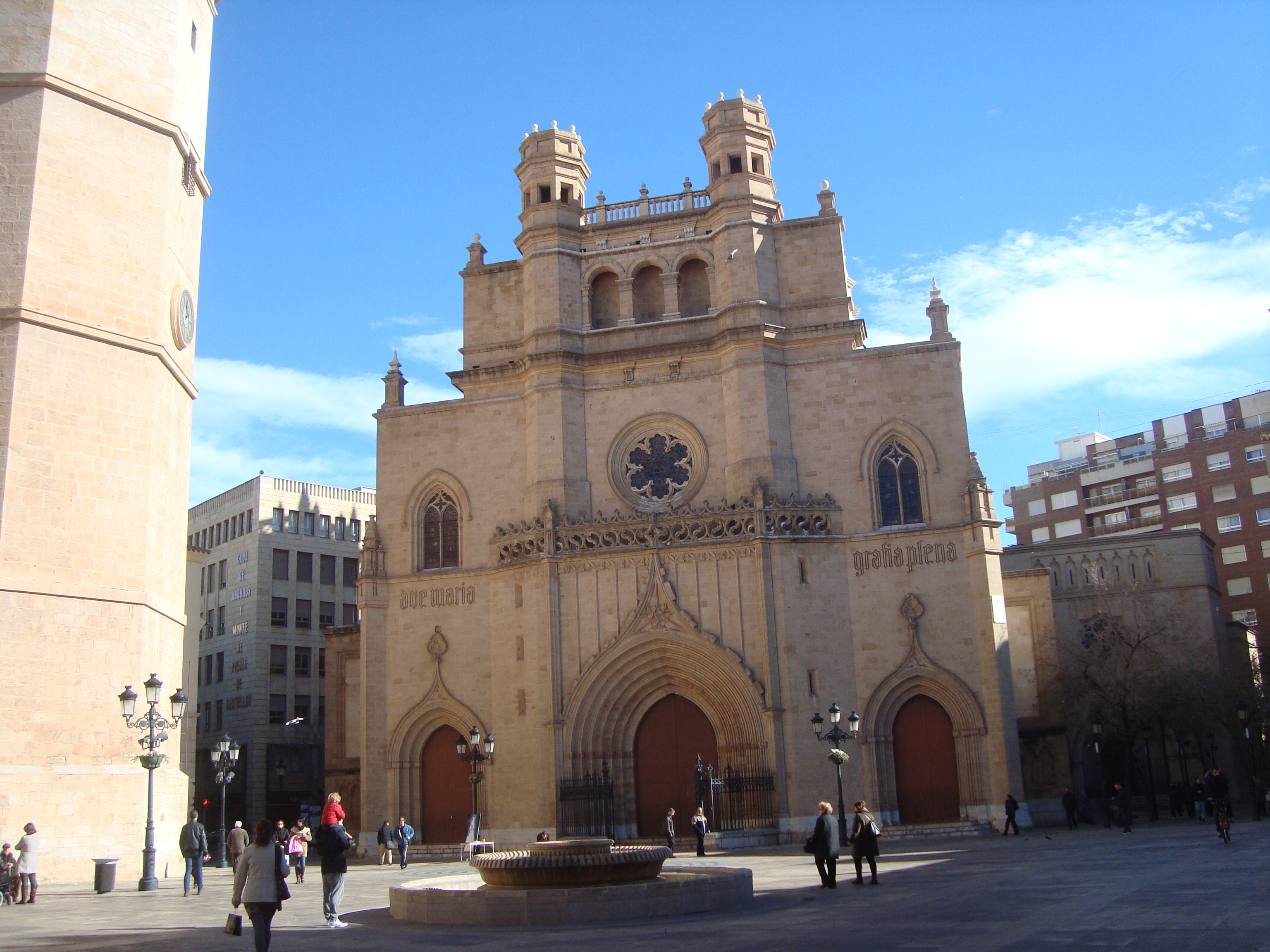 Iglesia concatedral de Santa María, Castelló de la Plana